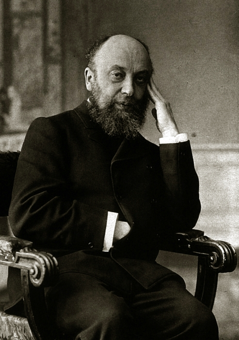 Огнёв, Иван Флорович